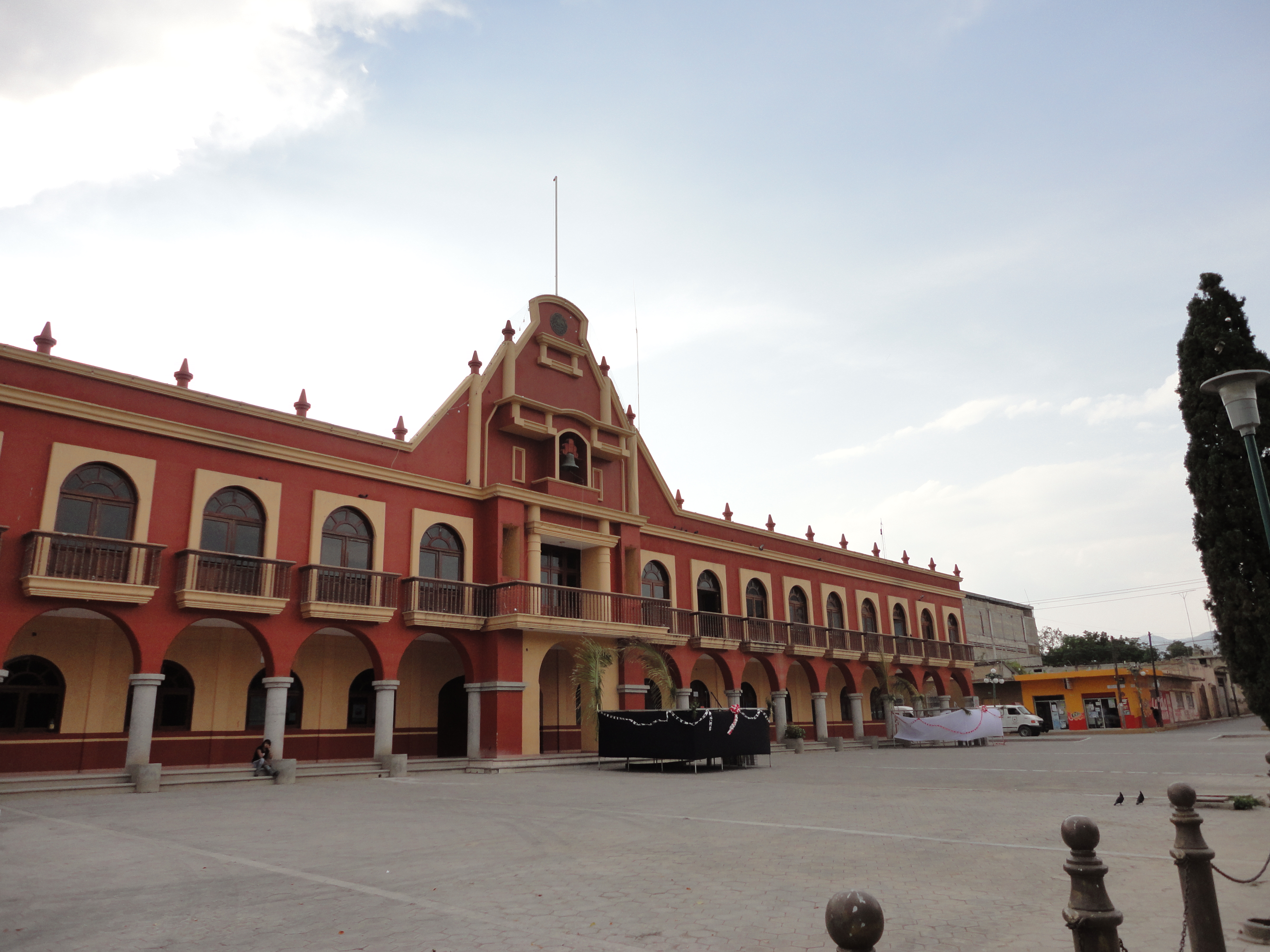 Fachada del Palacio Municipal de Ajalpan